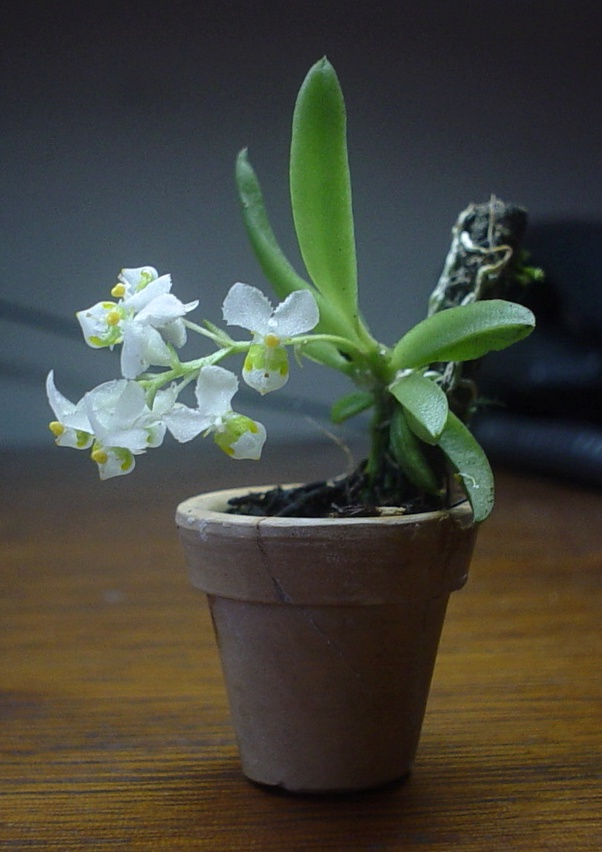 Zygostates papillosa Cogn. Microorquídea nativa da região sul do Brasil.